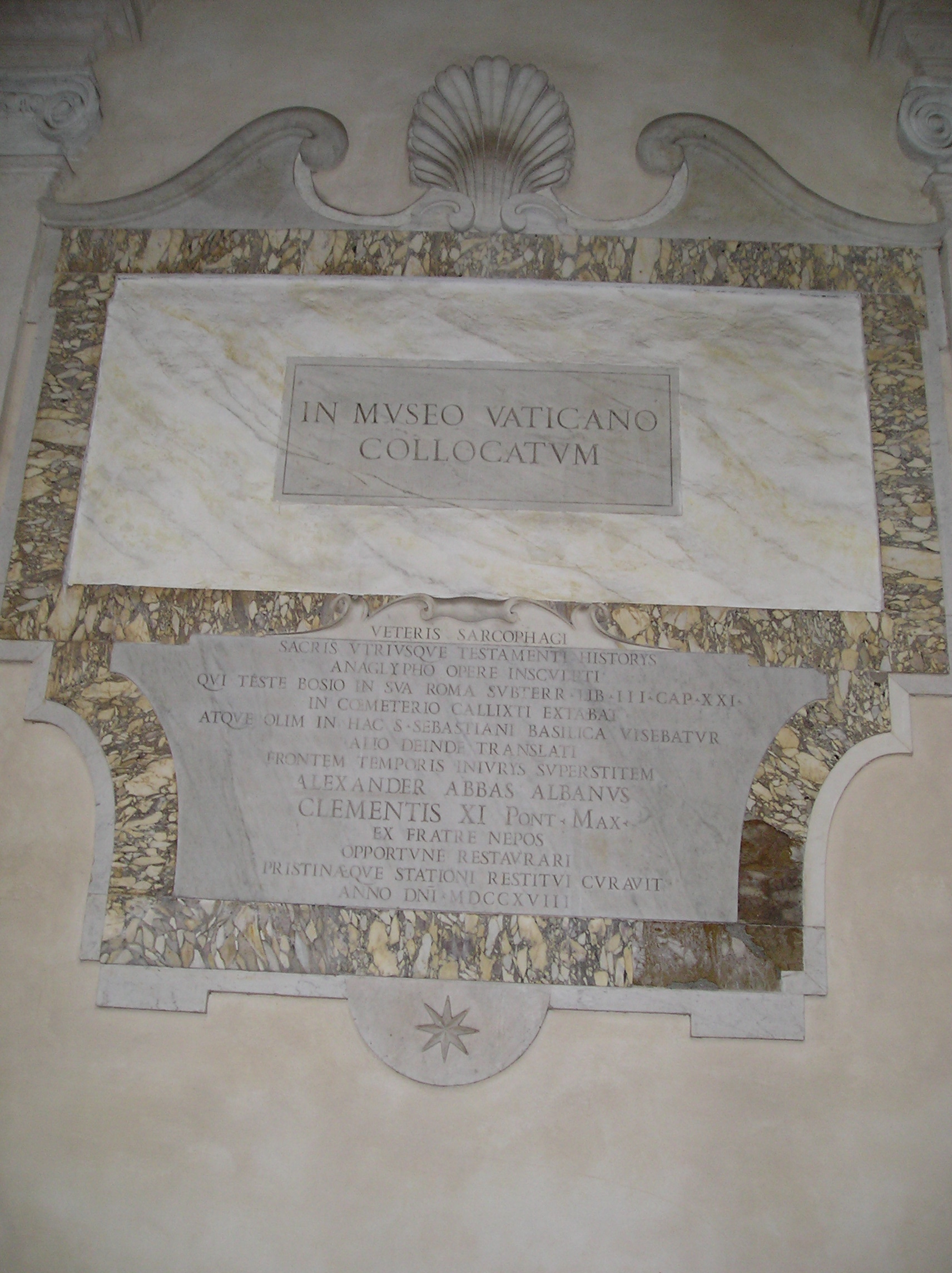 Catacombe 2